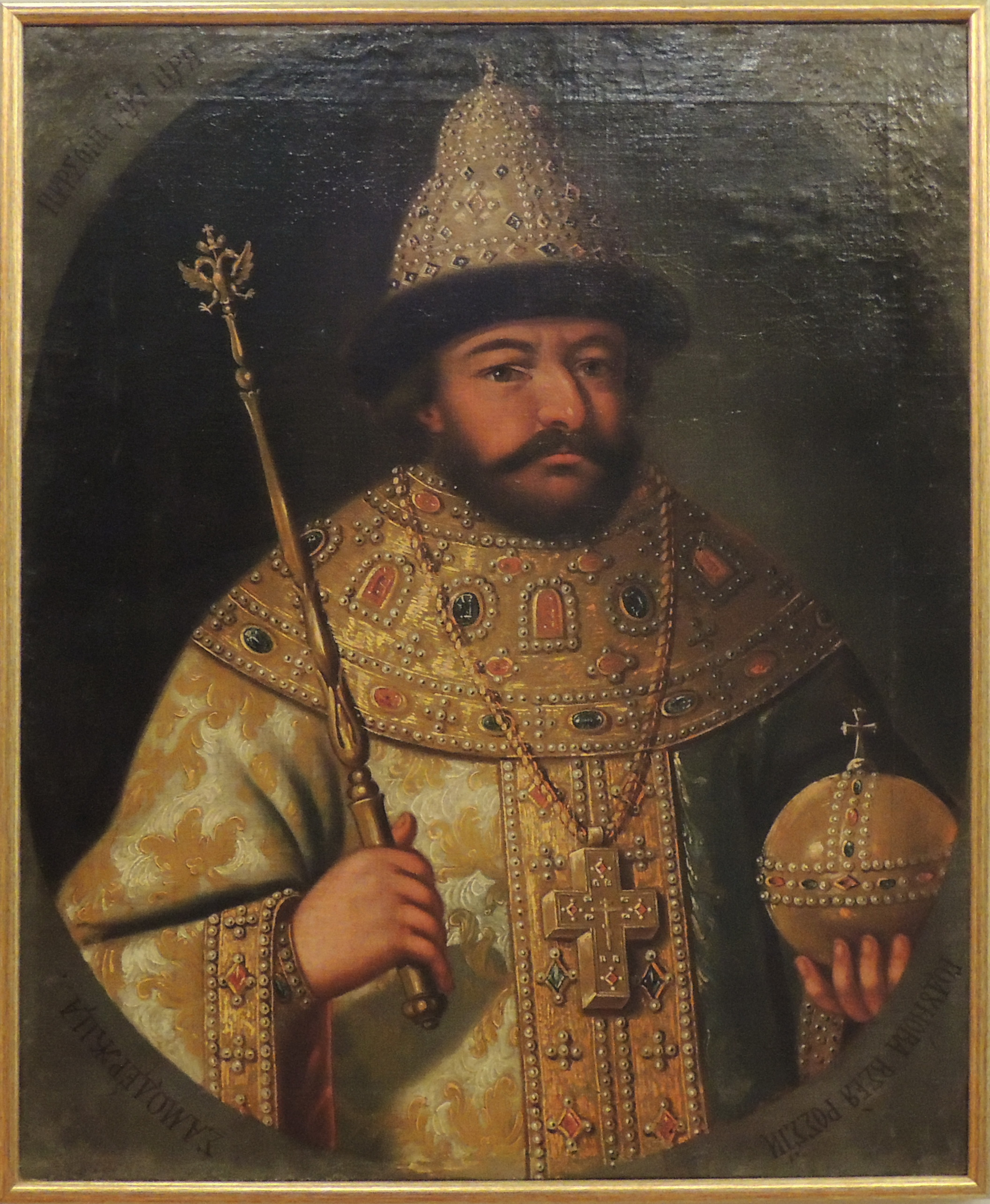 Выставка "Романовы. Начало династии", приуроченная к 400-летию избрания на царство Михаила Федоровича Государственный Исторический музей, весна 2013 года